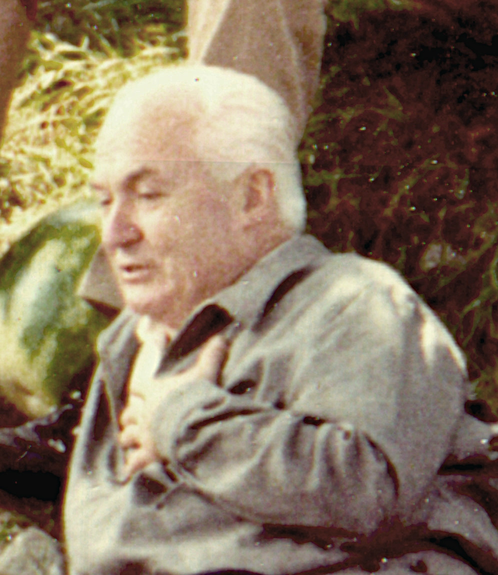 Carlo Carretto at Spello, July 1971